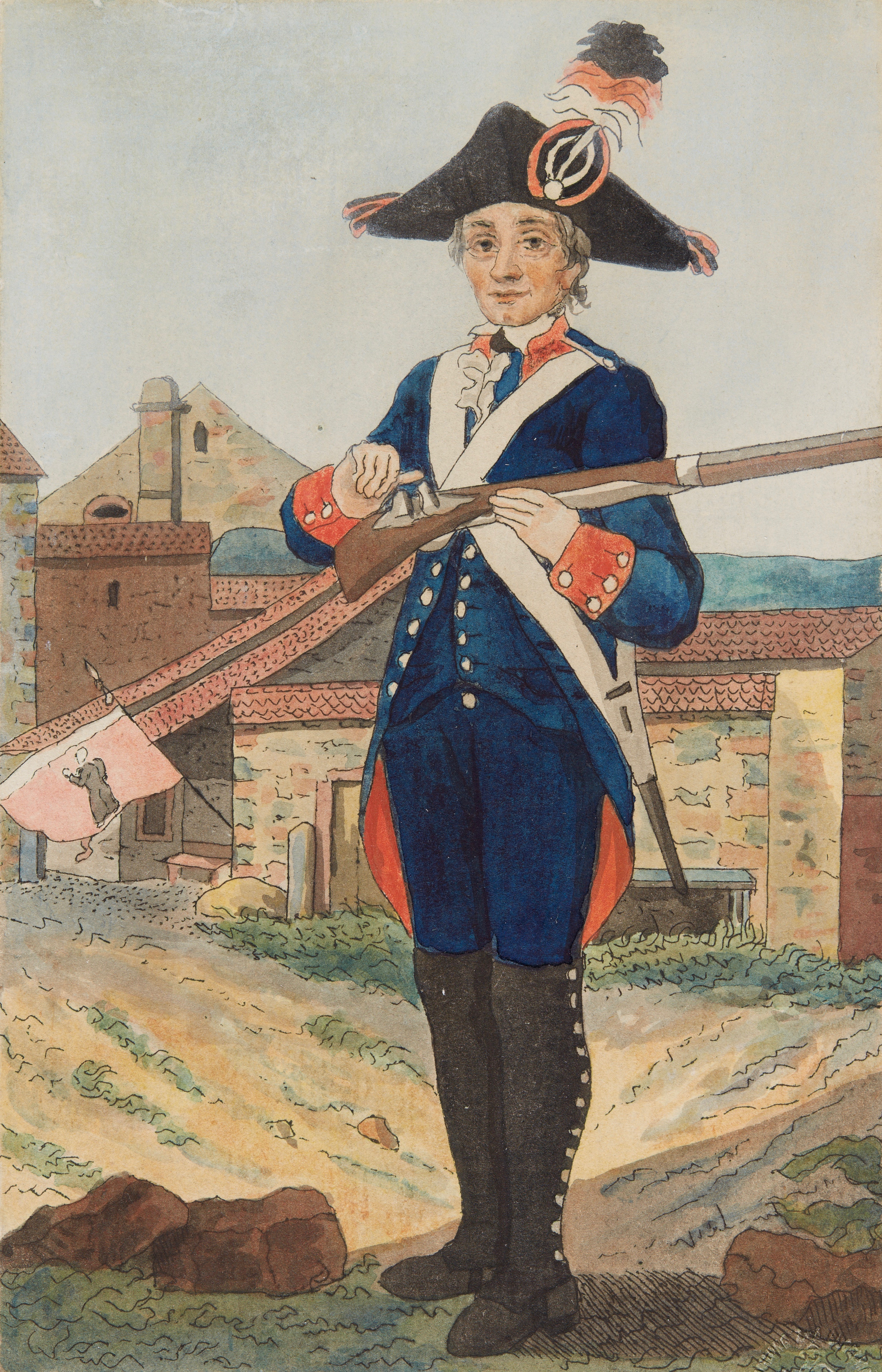 Reinhardt Keller (1759–1802): "Friedrich Wiechser aus dem Canton Glarus war 1792 als Zuzüger in Basel." Schweizerische Nationalbibliothek, GS-GUGE-KELLER-R-F-9.